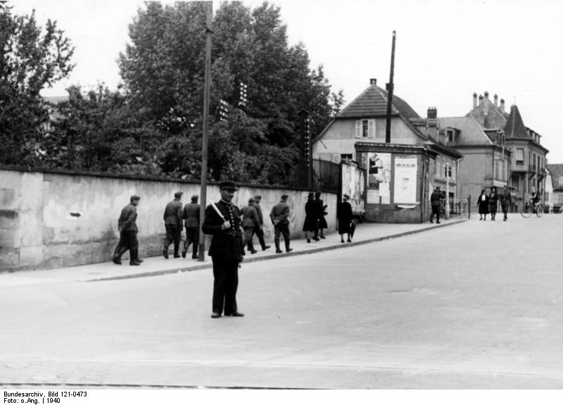 Frz. Verkehrspolizei in Mülhausen Information added by Wikimedia users.